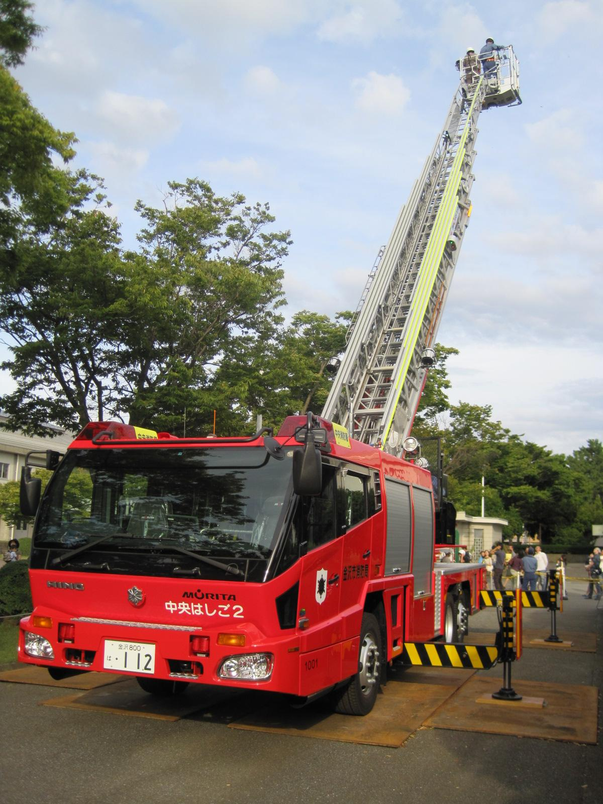 金沢市消防局中央消防署所属のはしご車（モリタ「スーパージャイロラダーシリーズ」、40m級）。日野・MHをベースとしている。 2010年9月26日 石川県産業展示館にて撮影。